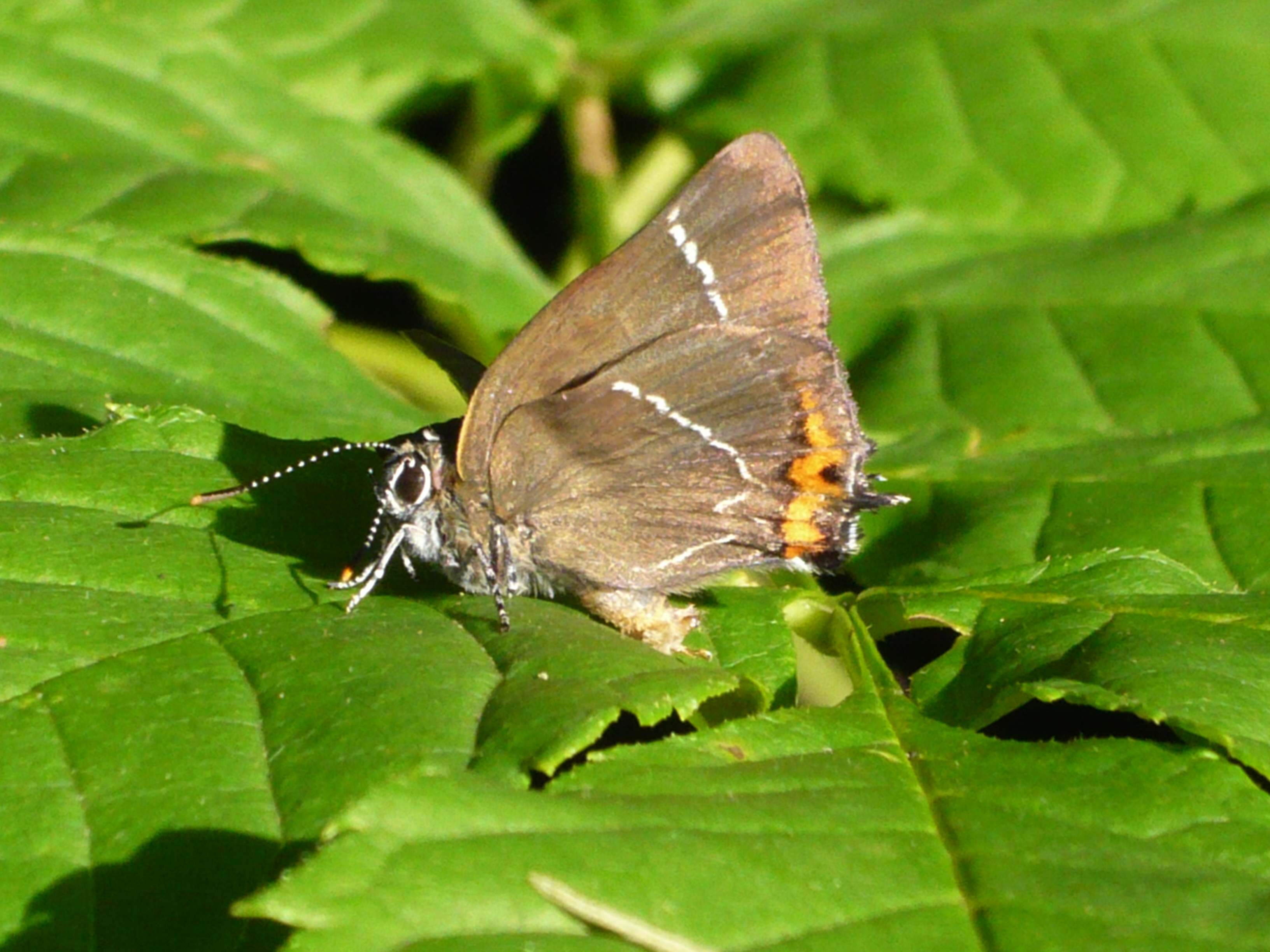 Satyrium w-album